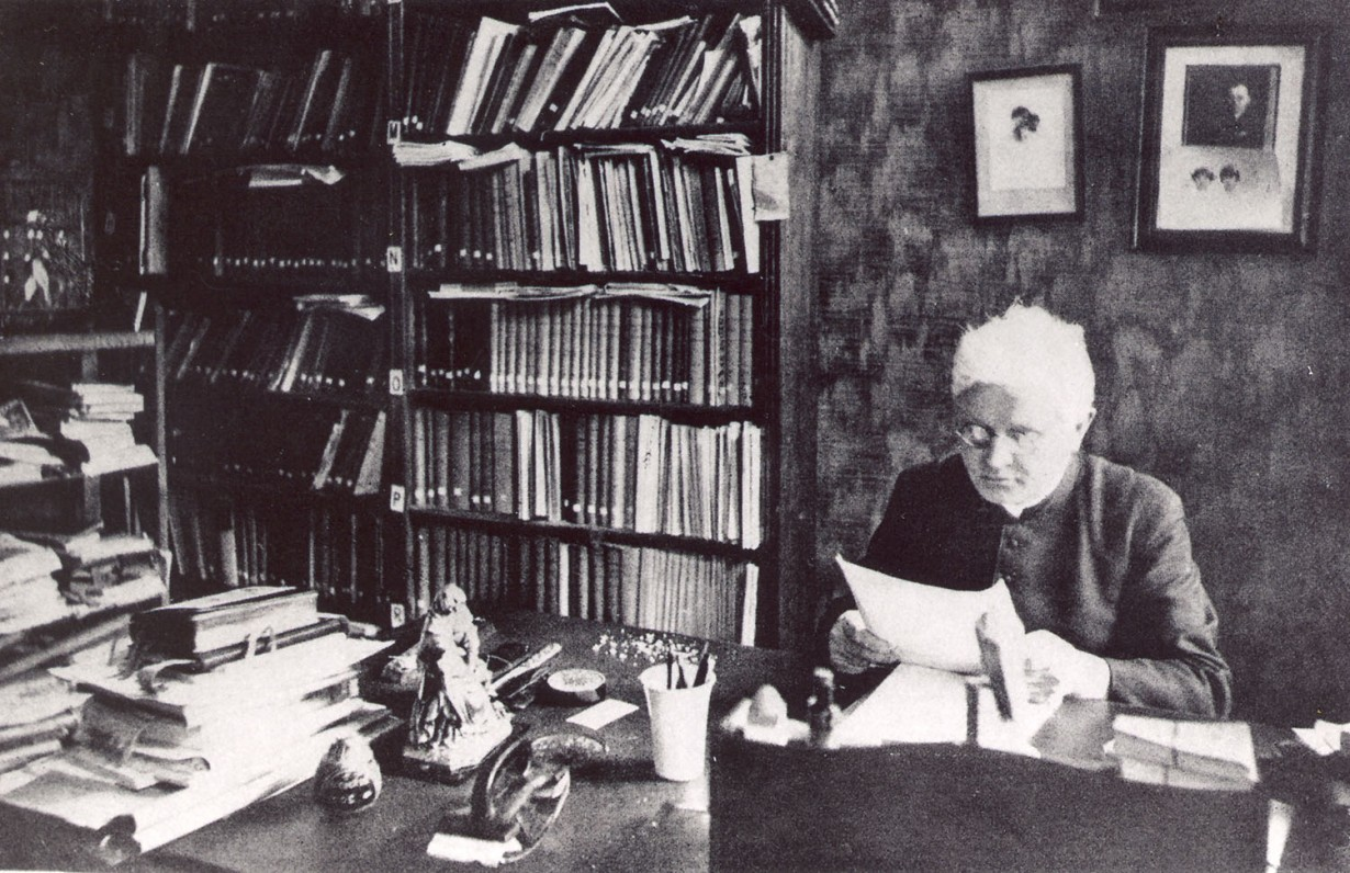 Juozas Tumas-Vaižgantas in his apartment in Kaunas